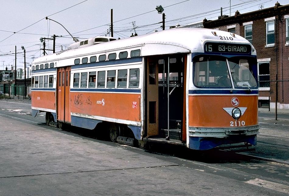 PCC in Philadelphia, 1970?